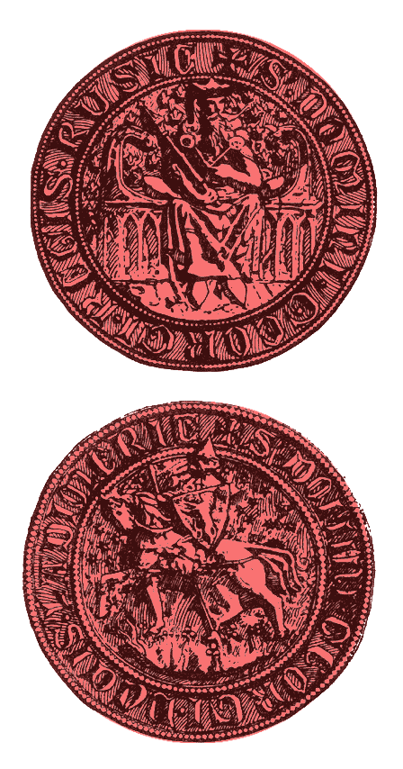 Печатка Юрія ІІ Болеслава, князя ГВК. Надпис: "S[igillum] Domini Georgi Regis Rusie" - Печатка Пана Георгія-Юрія Короля Русі. На звороті: "S[igillum] Domini Georgi Ducis Ladimerie" - Печатка Пана Георгія-Юрія Князя (Во)лодимирії - тобто Володимирської землі